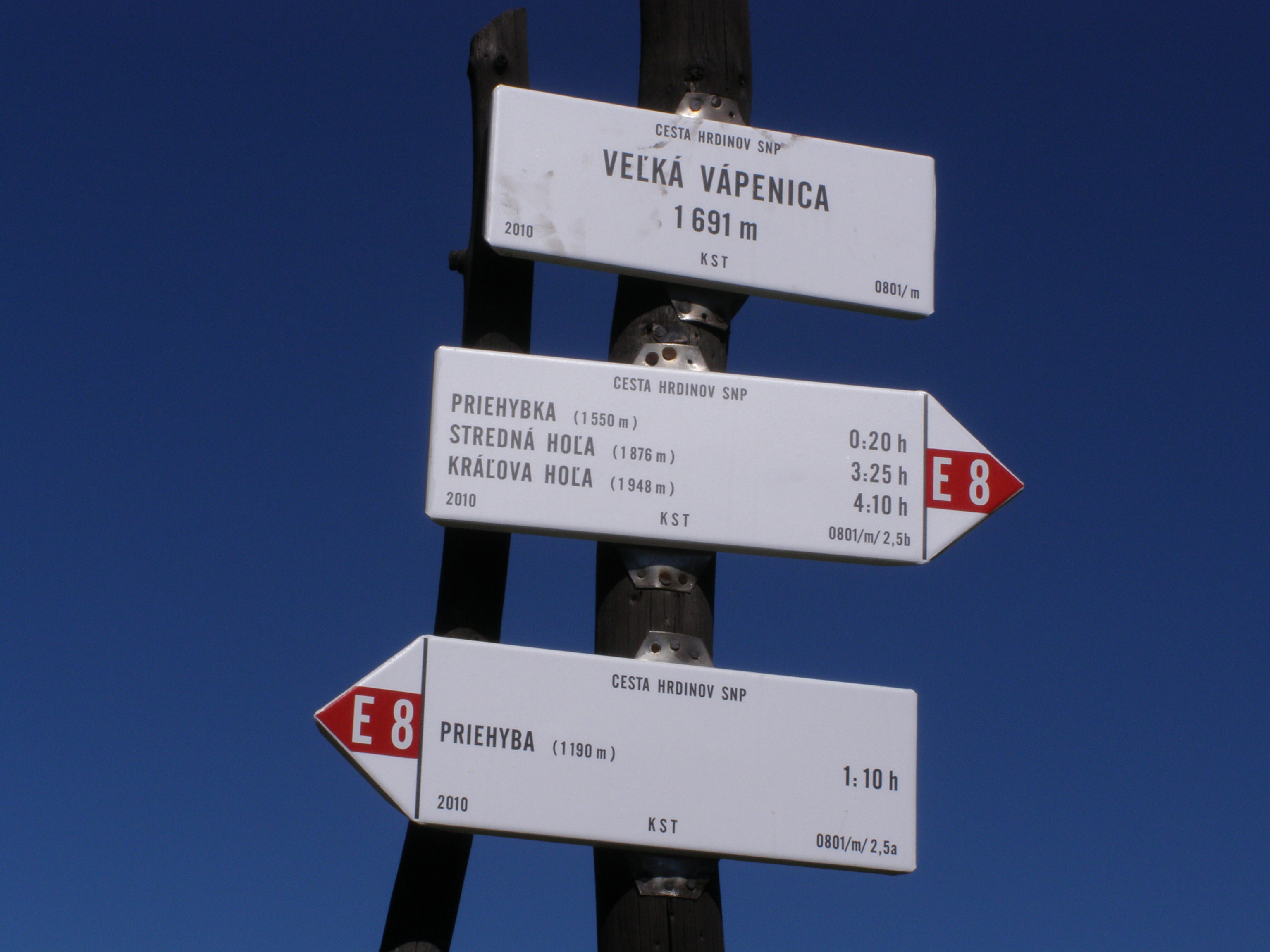 Nízké Tatry, Kráľovohoľské Tatry, rozcestník na vrcholu Veľká Vápenica (1691 m)